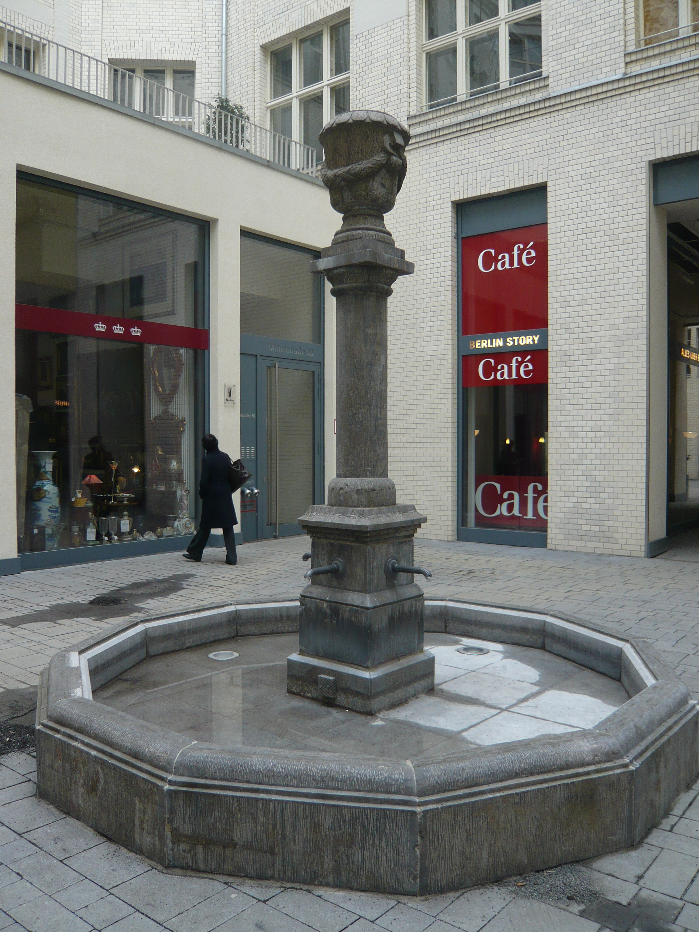 Kaiserhöfe